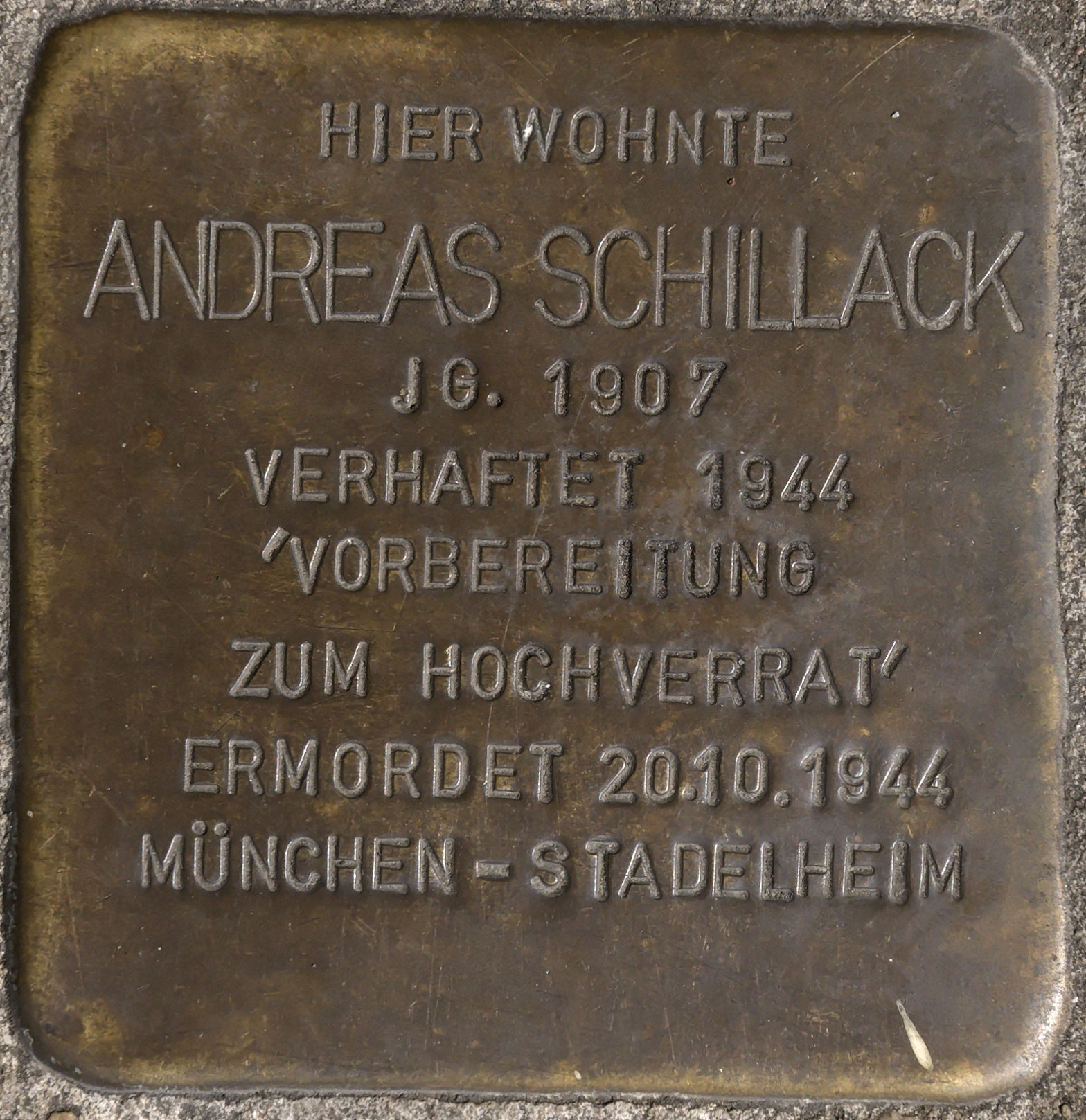 Stolperstein in Gelsenkirchen-Horst, Essener Str. 71, Andreas Schillack